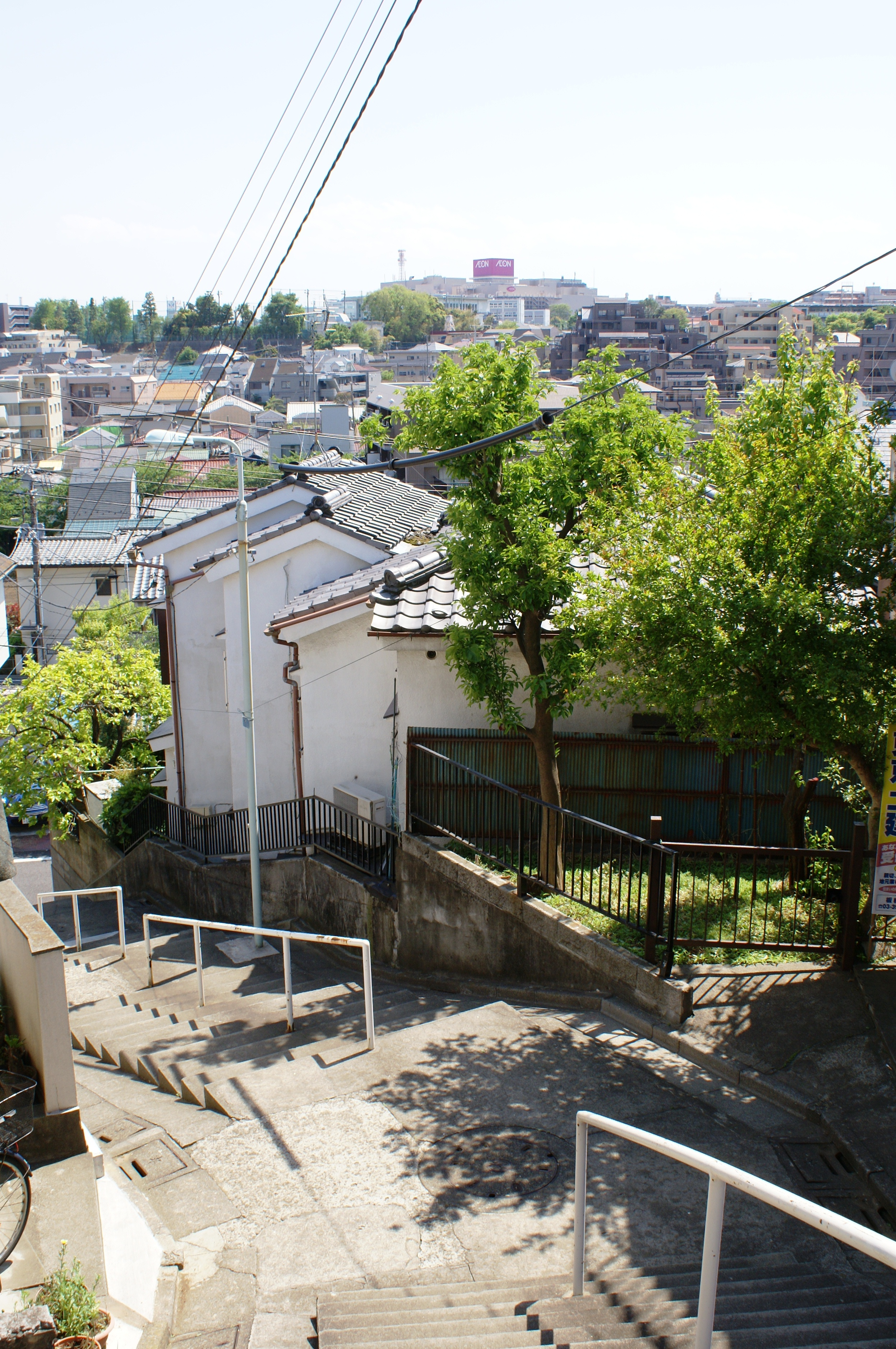 旧前谷津川沿いの谷地形とイオン板橋店